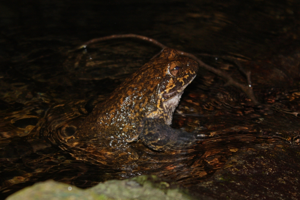 Taken at Tai Mo Shan.